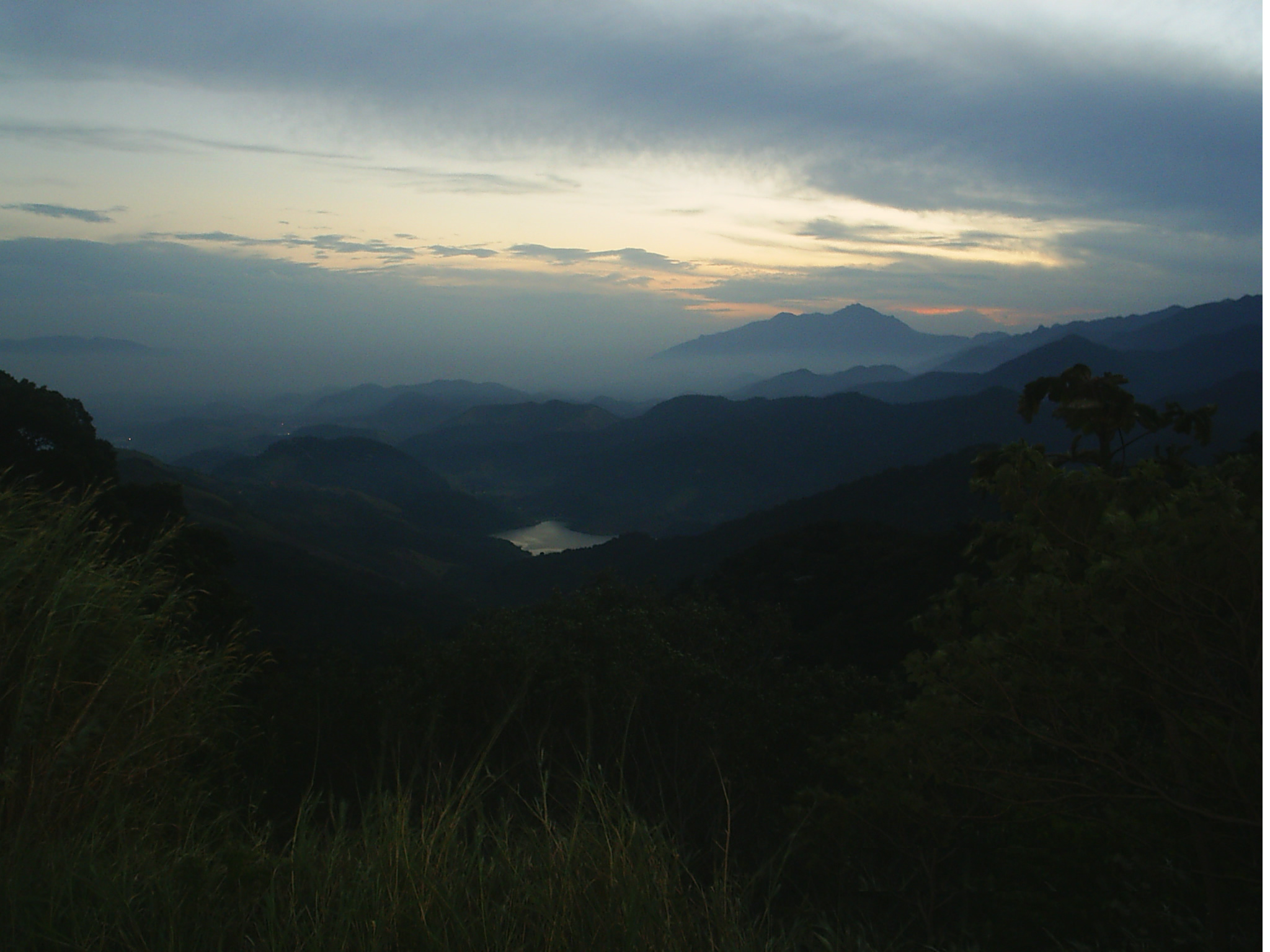 Decida da Serra de Petrópolis em direção ao Rio de Janeiro. Petrópolis (Serra de Petrópolis) Description: Foto retirada na descida da Serra de Petrópolis indo em direção ao Rio de Janeiro, em 18 de junho de 2005 às 17:45. Esta foto foi tirada a partir da rodovia federal BR-040, sendo que ao centro da imagem, também pode ser vista a Represa do Garrão, que está localizada no vale do Rio Saracuruna. Photographer: Marco de Souza